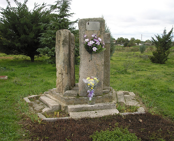 Monumento en homenaje a las víctimas del accidente del paso a nivel de Muñoz (21-12-1978).